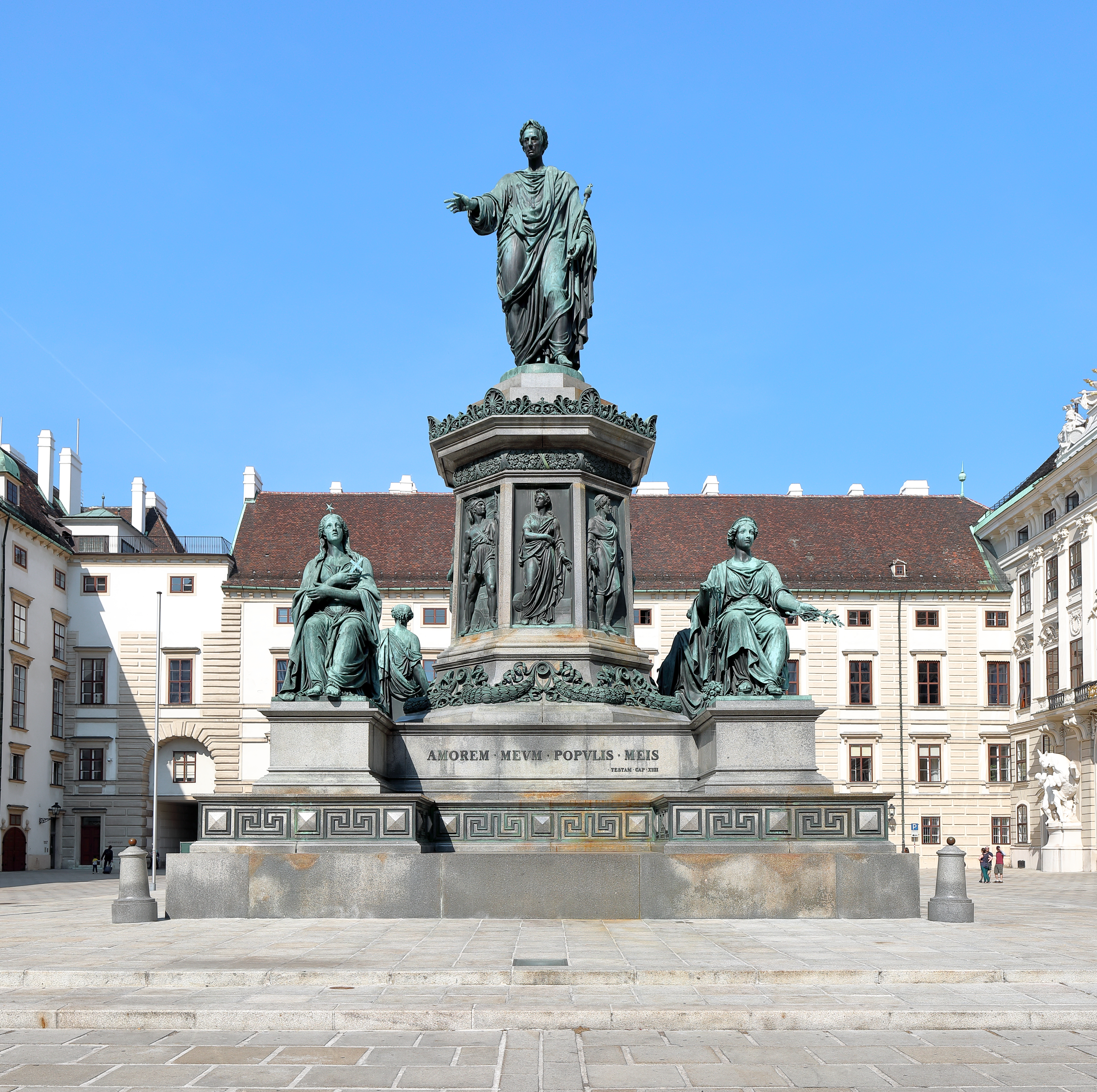 Das Denkmal Kaiser Franz I. (II.) am Inneren Burgplatz (In der Burg) der Hofburg in der österreichischen Bundeshauptstadt Wien und mit dem Amalientrakt im Hintergrund.Das Monumentaldenkmal für den ersten österreichischen Kaiser und letzten des Heiligen Römischen Reiches Franz I. (II.) wurde auf Veranlassung von Kaiser Ferdinand I. von dem Bildhauer Pompeo Marchesi geschaffen und am 16. Juni 1846 enthüllt. Es stellt den Kaiser auf einem achteckigen Pfeiler in antiker Gewandung dar. An den Seitenfronten des Pfeilers sind bronzene Reliefs angebracht, die die Tätigkeiten des Volkes darstellen. Flankiert wird der Pfeiler von vier Kolossalstatuen, die den Glauben, die Stärke, den Frieden und die Gerechtigkeit symbolisieren.